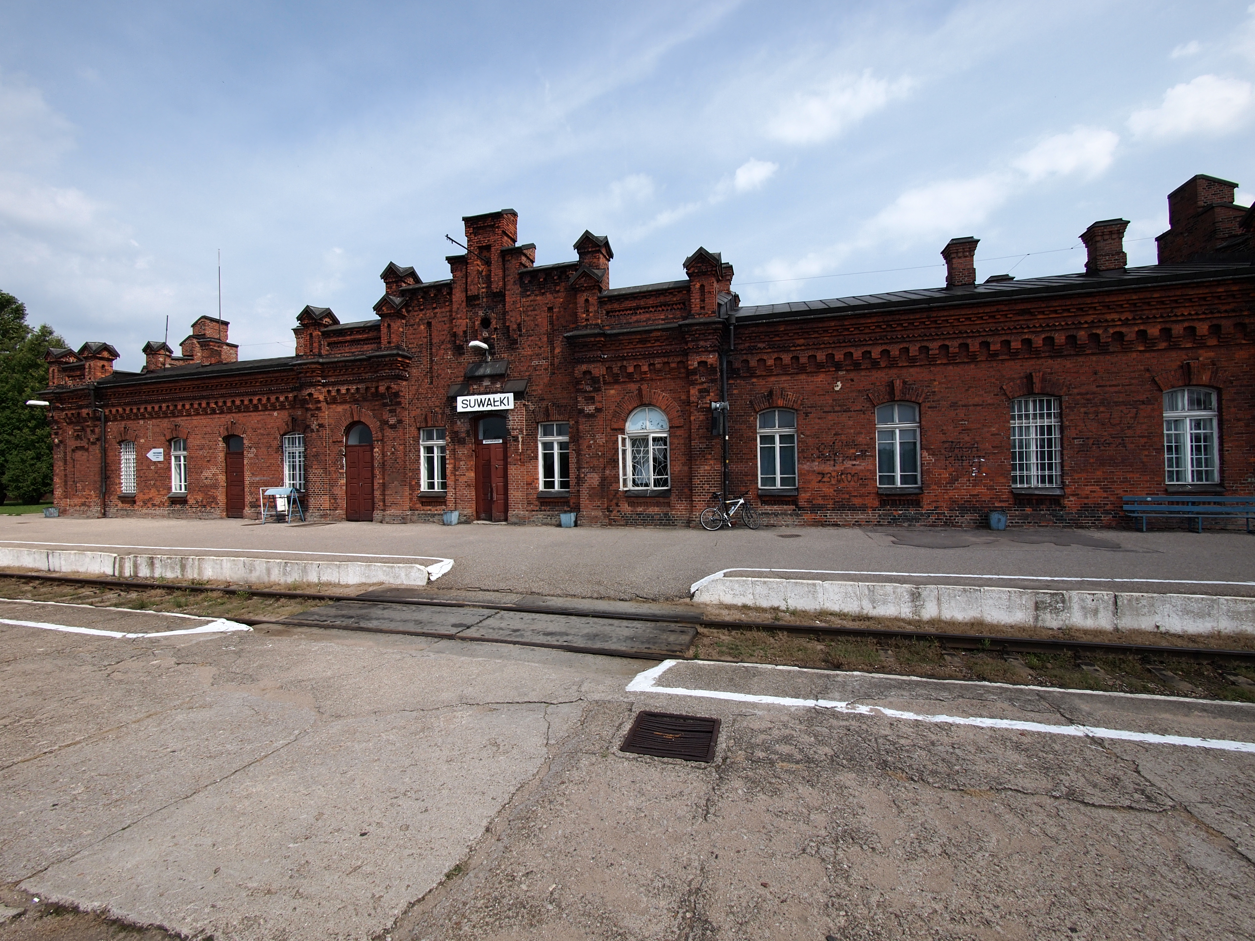 Suwałki, dworzec kolejowy.